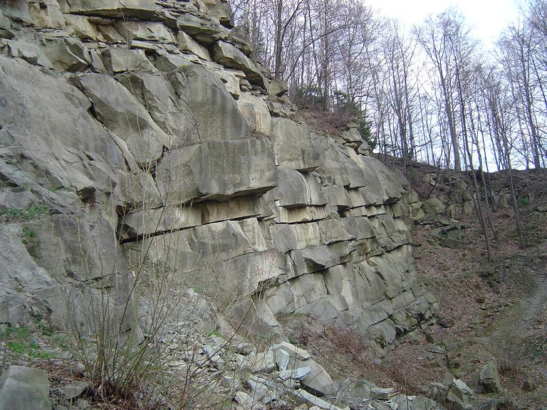 Godula (skála) 2